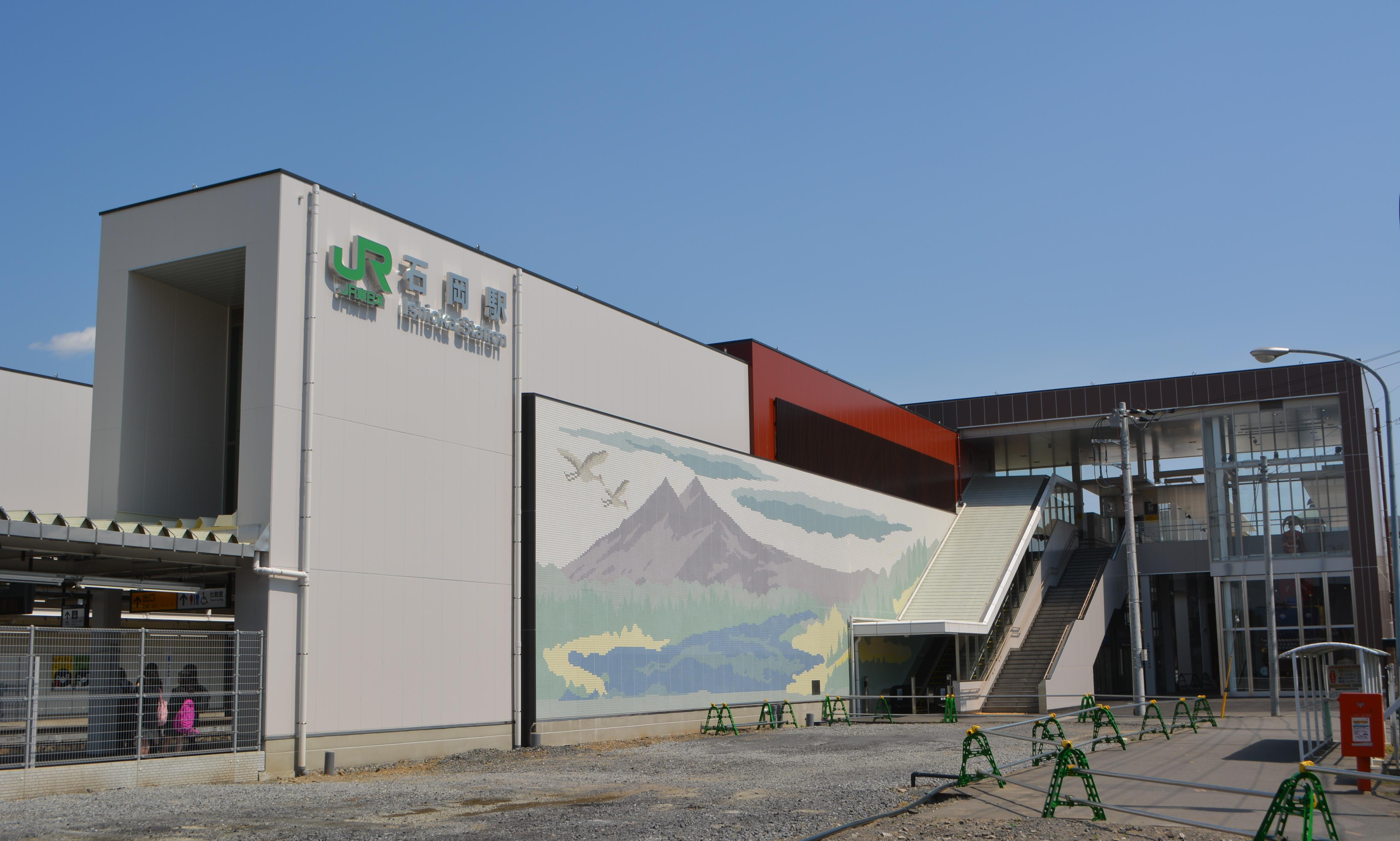 石岡駅。2016.3竣工。石岡市。